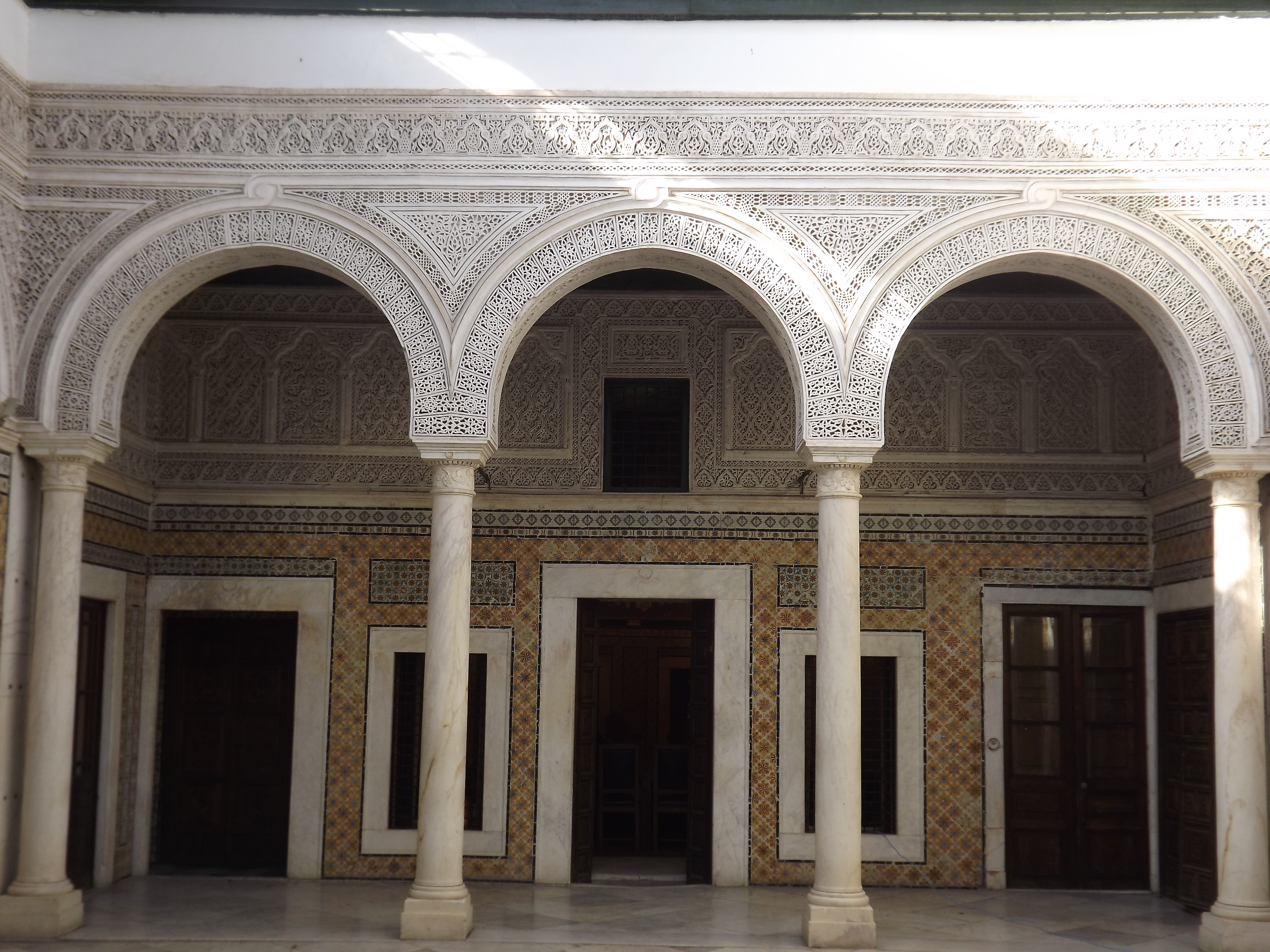 L’intérieur du Dar lasrem